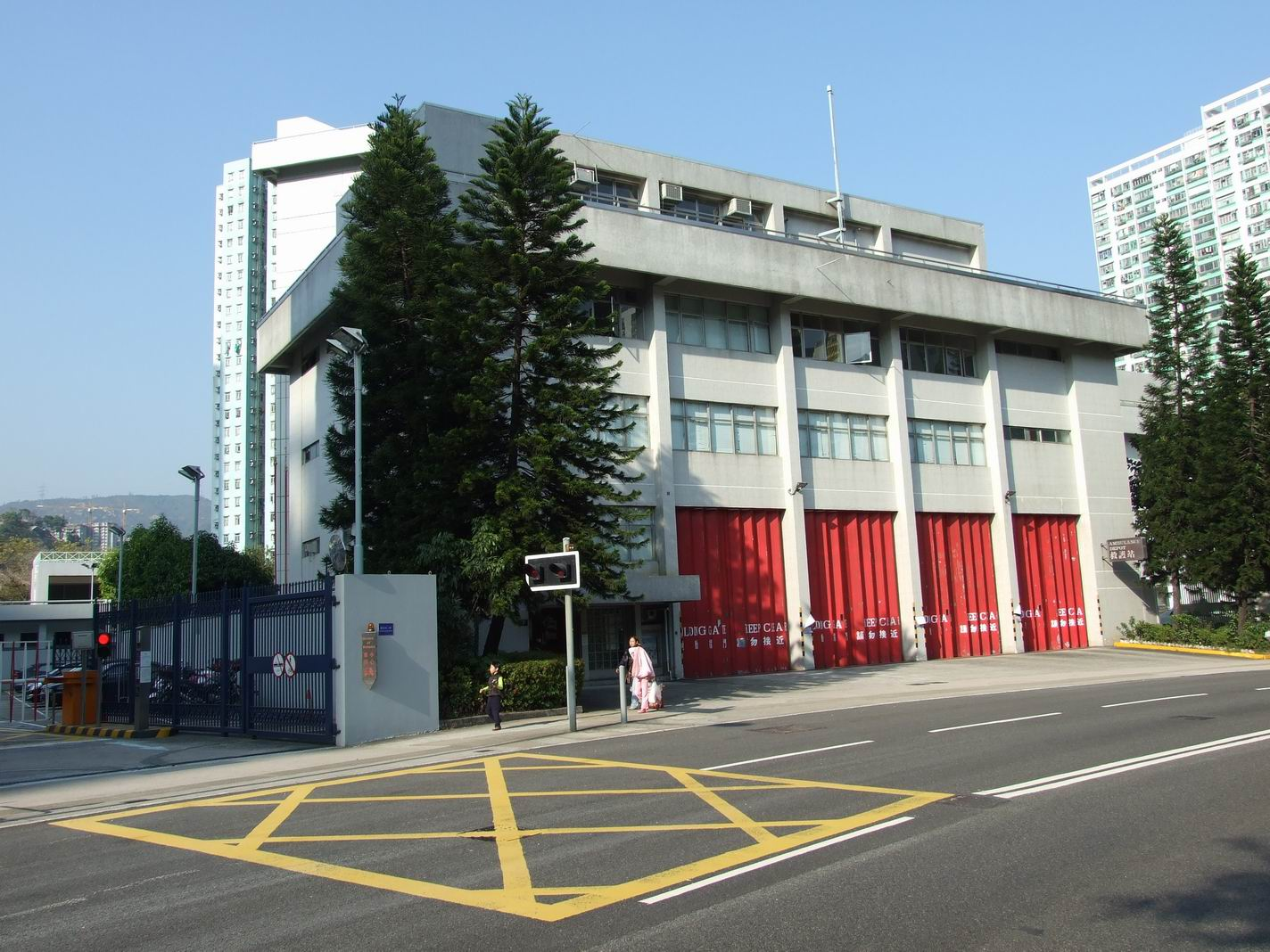 田心救護站